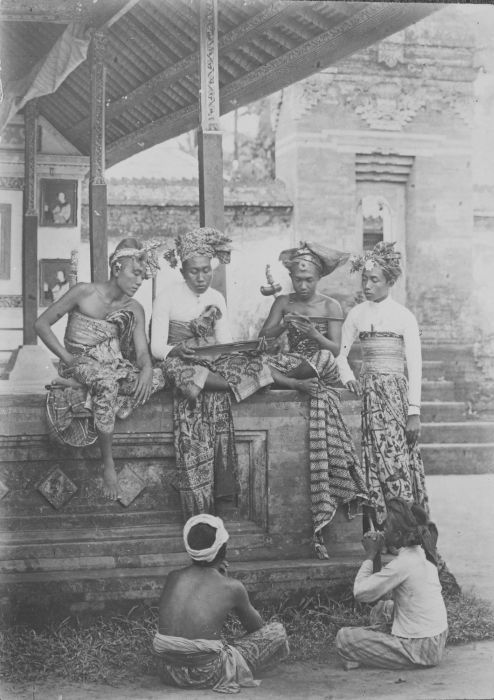 foto. Een groep mannen leest (en beschrijft?) een lontarhandschrift, in een ruimte naast de poort van een tempel op Bali